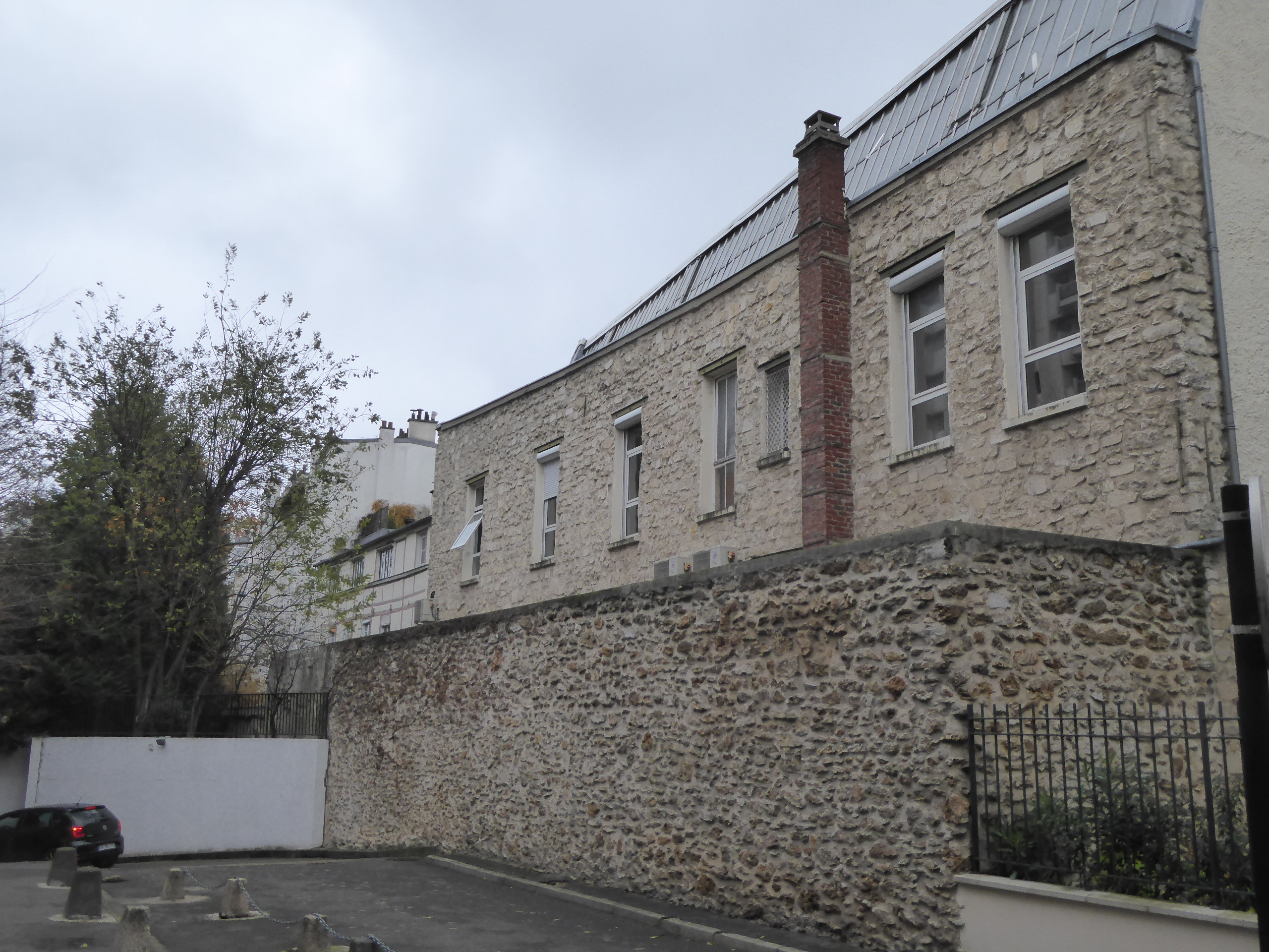 Square Adanson emplacement de la Bièvre recouverte